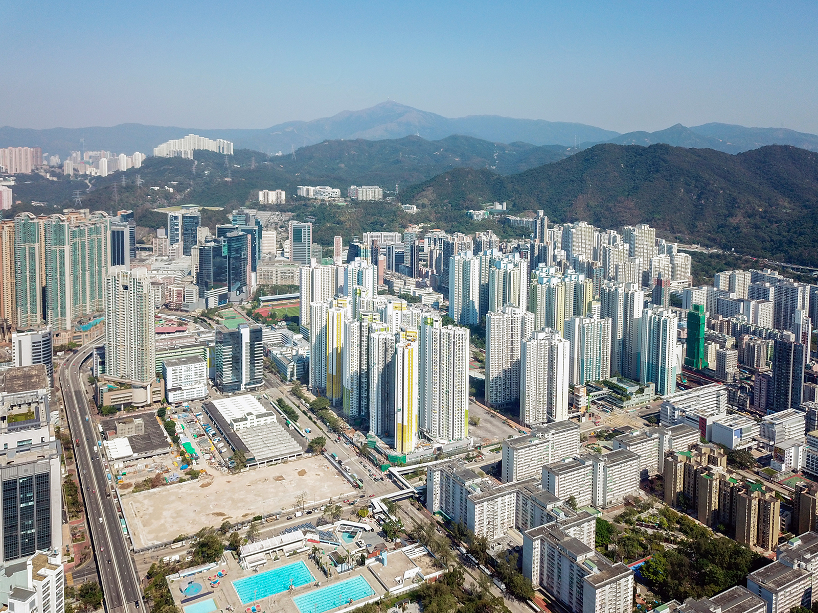 Cheung Sha Wan